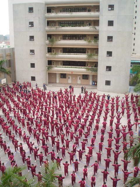 中文（香港）: 健身操